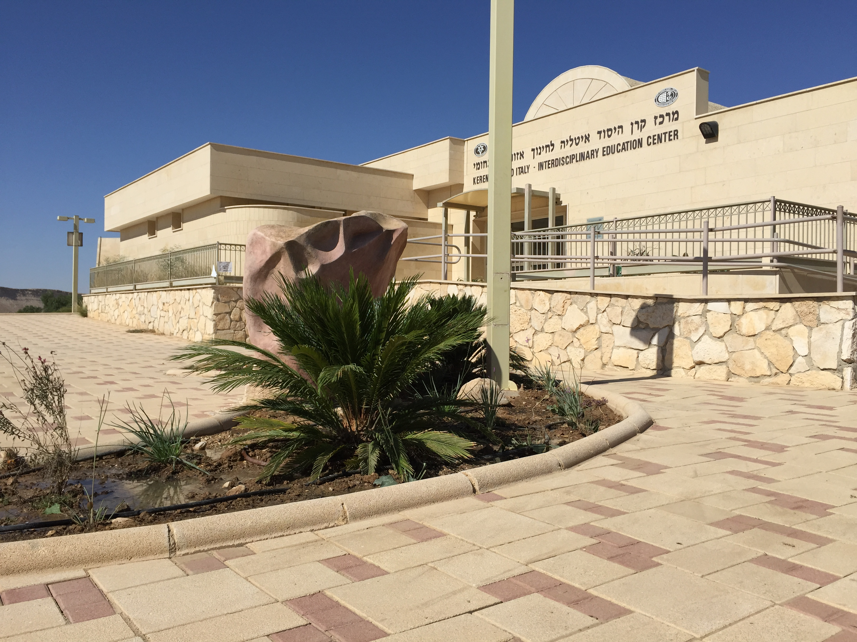 בניין הבינתחומי